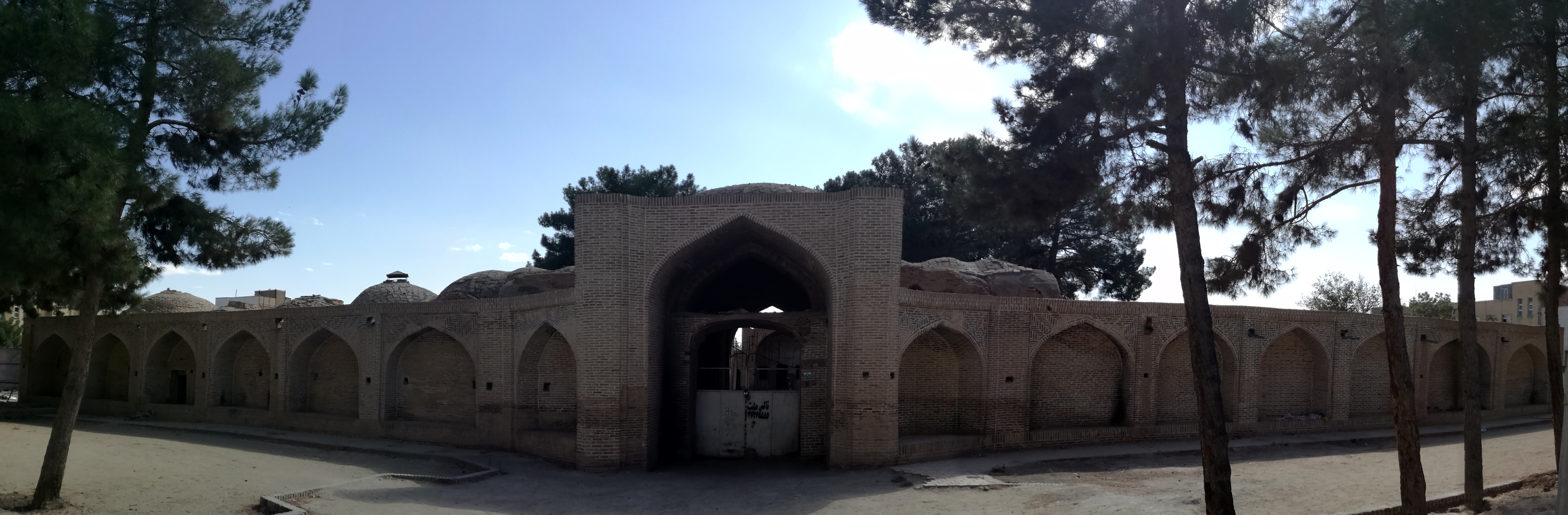 کاروانسرای شاه عباسی سبزوار - پادگان عربها